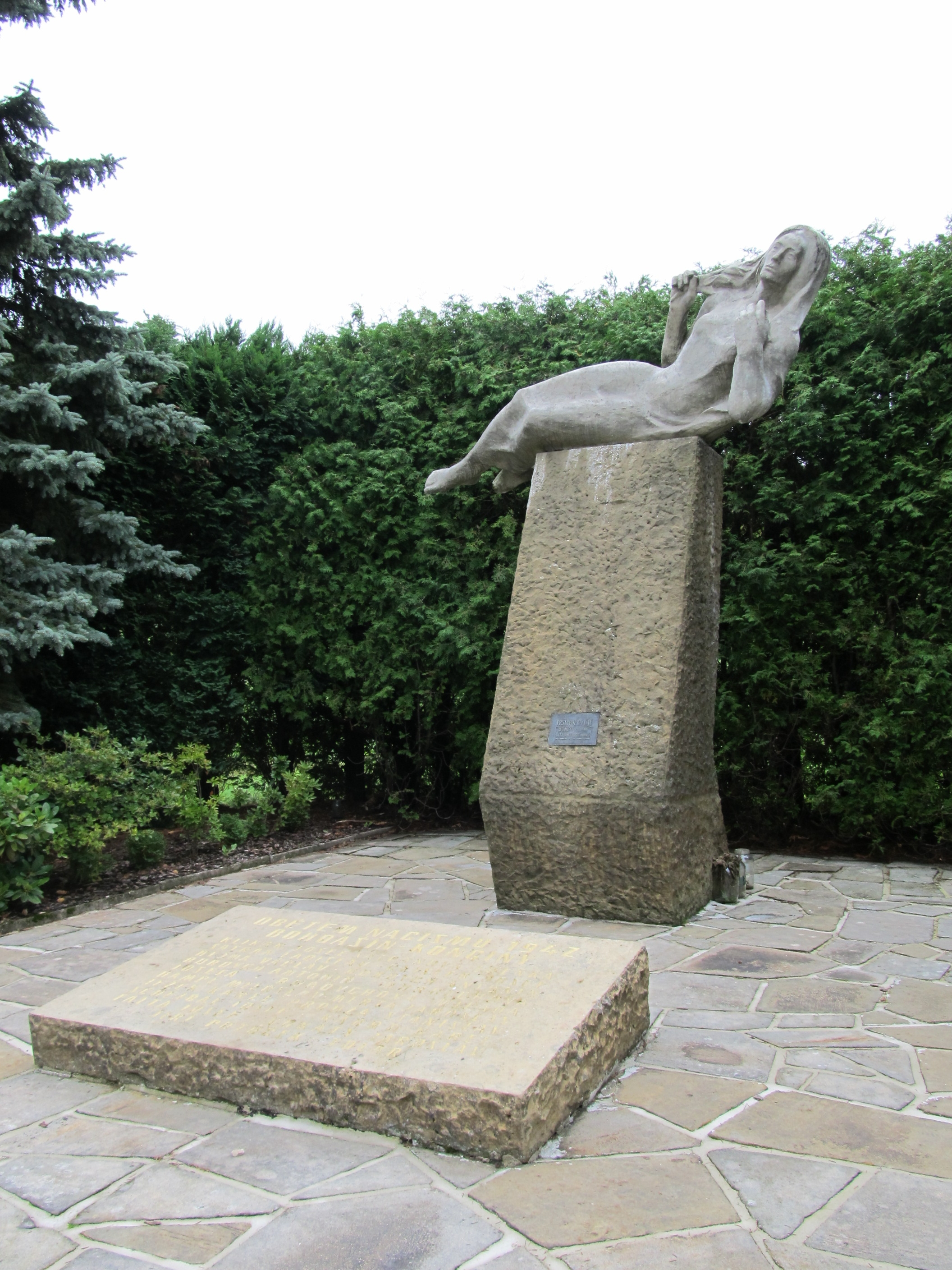 Pomník - památník vysílačky Libuše (Bohdašín), u silnice, Bohdašín